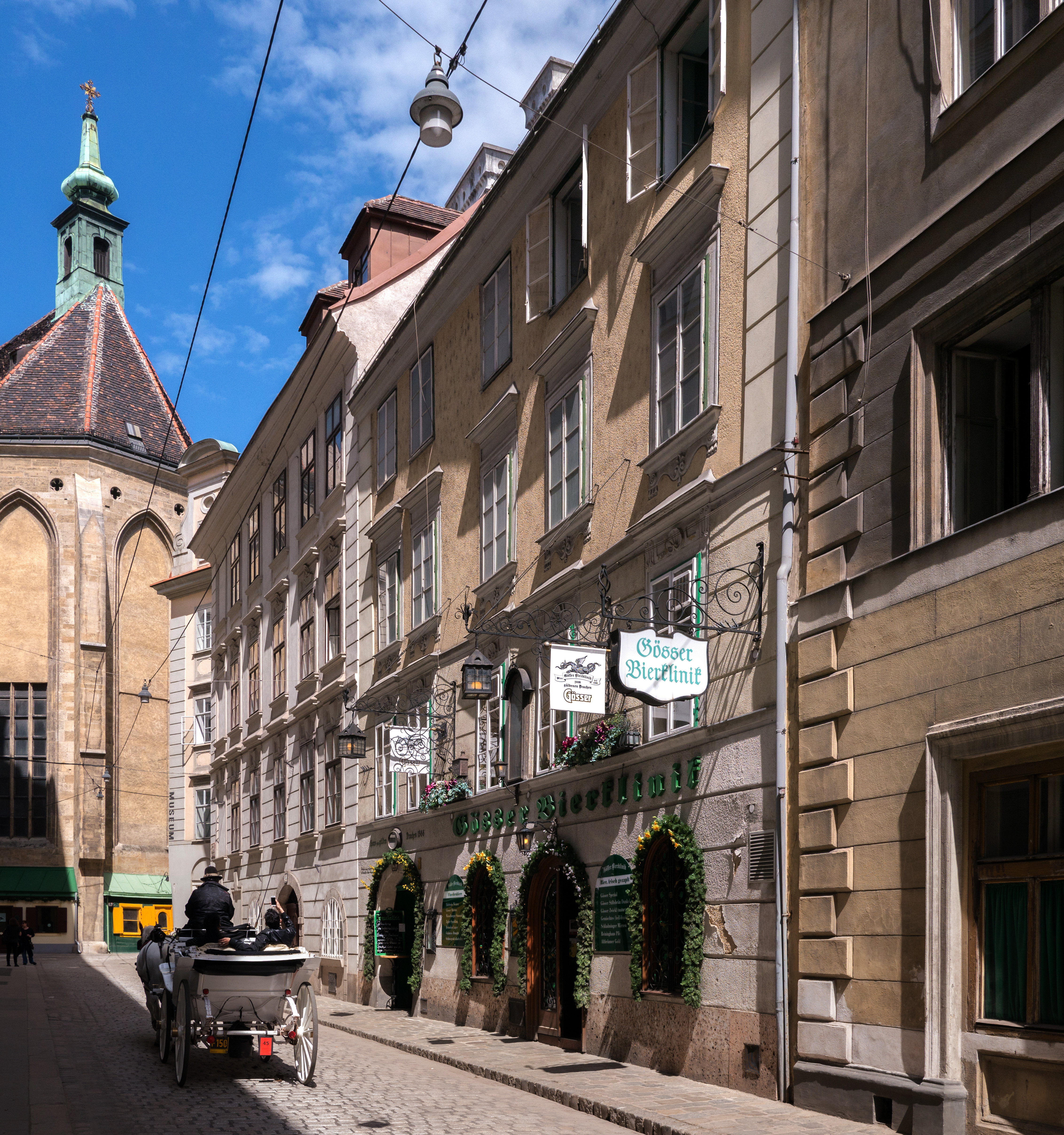 Gasthaus, Gösser Bierklinik, Zum goldenen Drachen; Kitsch trifft Kitsch; So schief wie am Foto ist es auch.